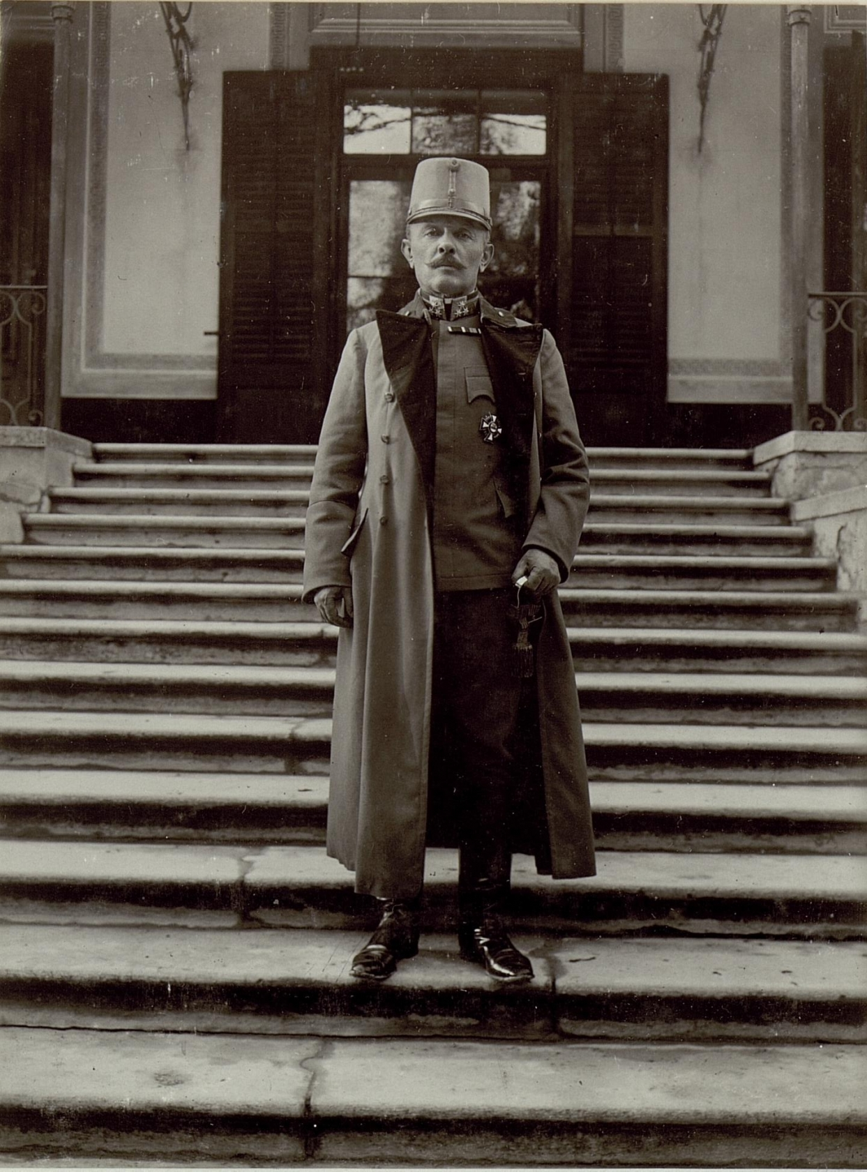 General der Infanterie Kommandant der 5. Armee, Adelsberg, Postojna, Isonzofront, heute Slowenien.